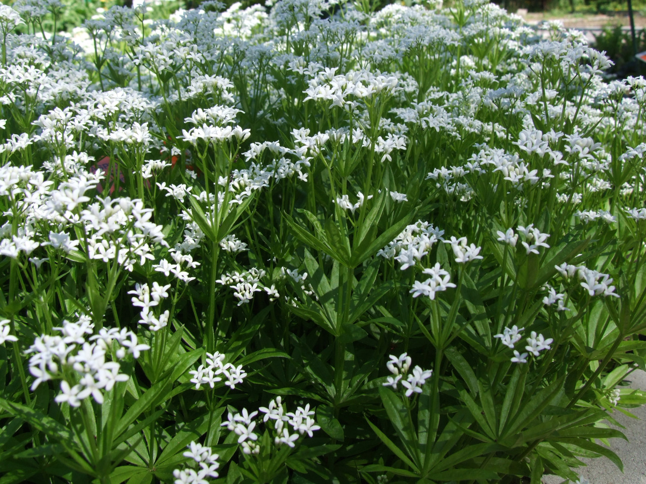 Asperula odorata